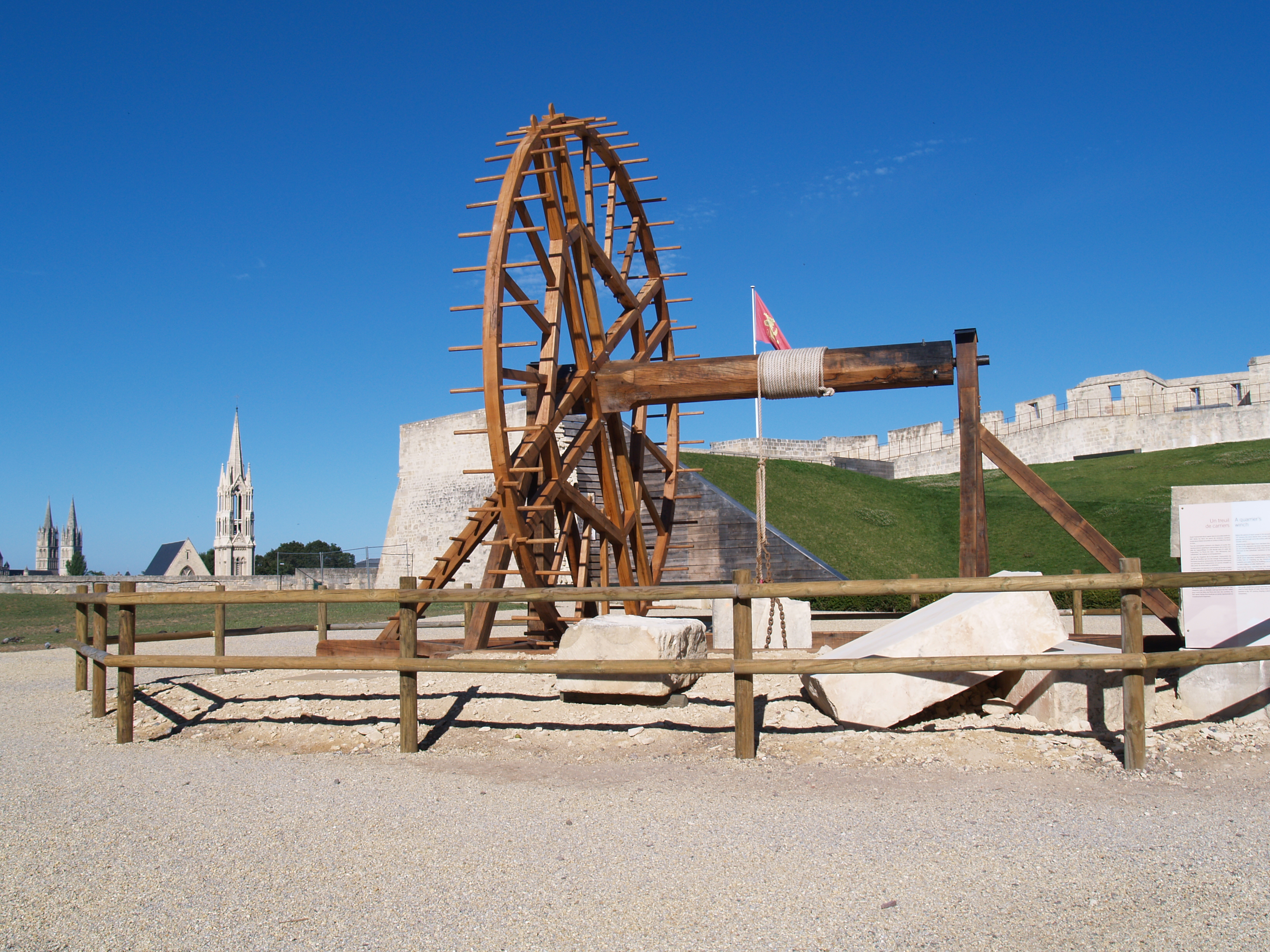 treuil servant à remonter la pierre de Caen, reconstitué par les charpentiers du GRETA de Honfleur et exposé dans le château de Caen à l'occasion de l'exposition La Pierre de Caen des dinosaures aux cathédrales organisée par le musée de Normandie .